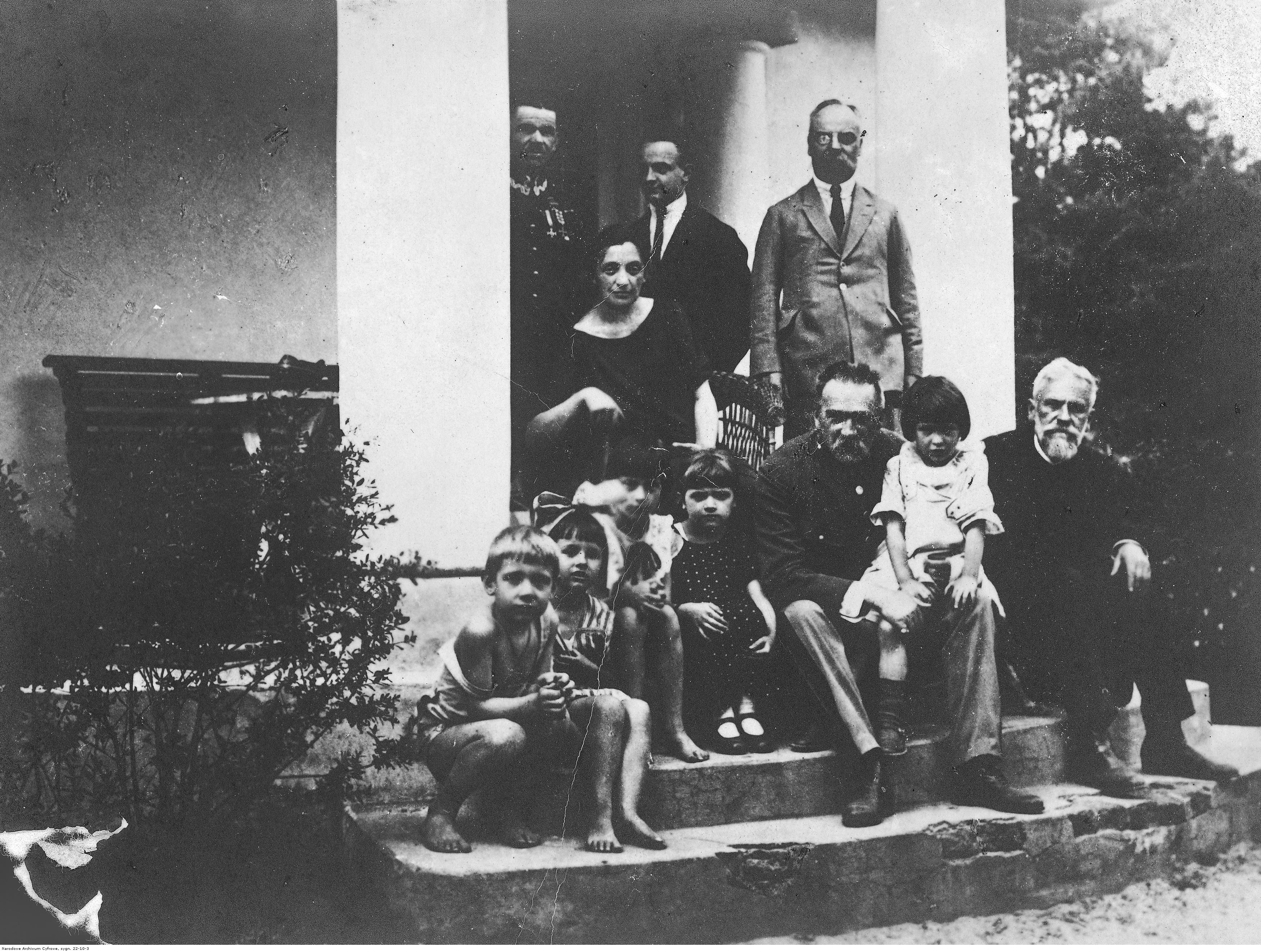 Józef Piłsudski w towarzystwie m.in.: żony Aleksandry, córek Jadwigi i Wandy, prof. Odo Bujwida (siedzi obok Marszałka) oraz swojego adiutanta por. Michała Galińskiego przed willą.